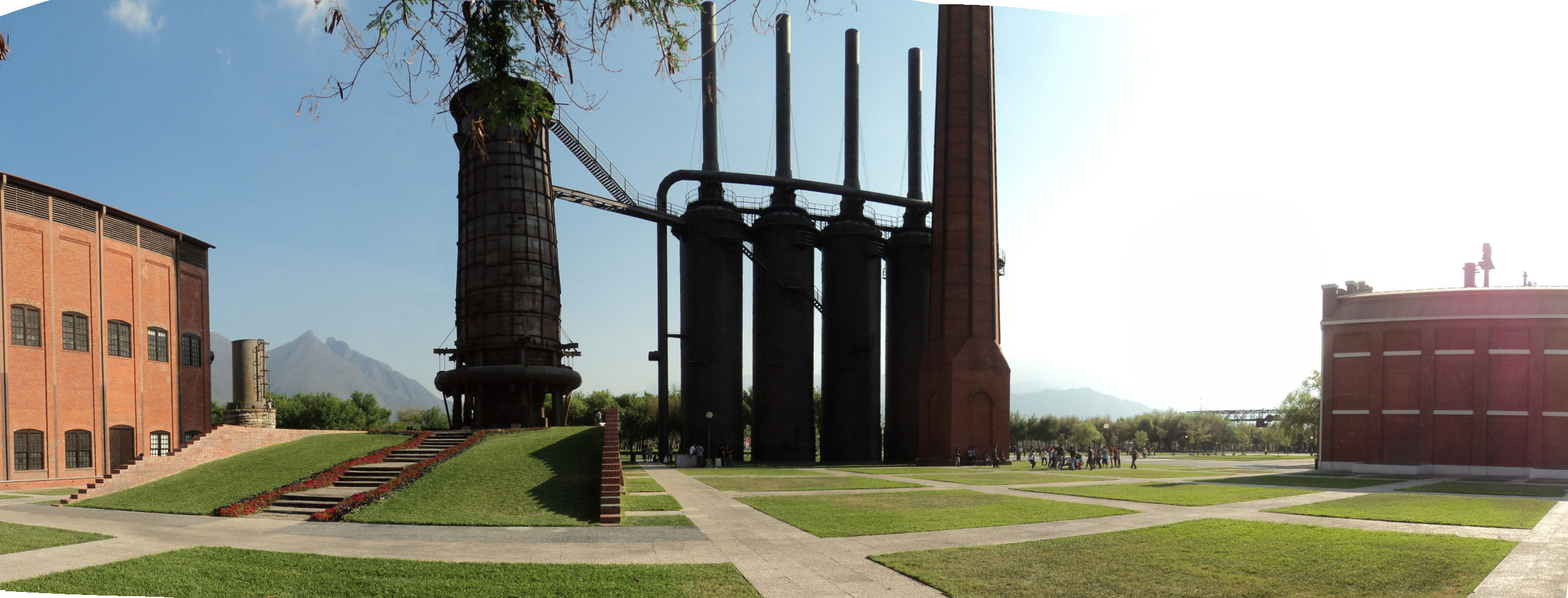 Hornos en Fundidora.